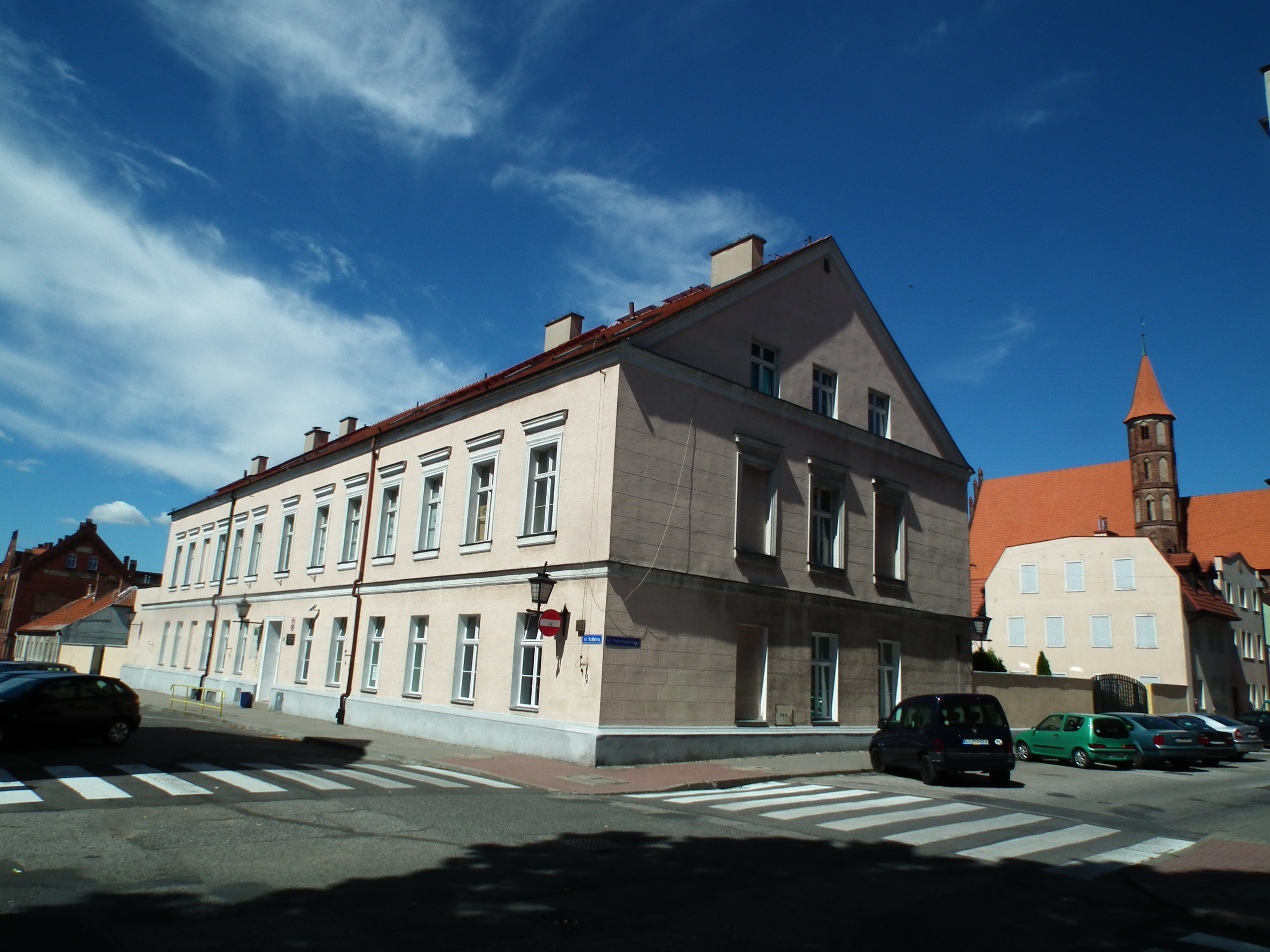 Budynek d. Akademii Chełmińskiej.